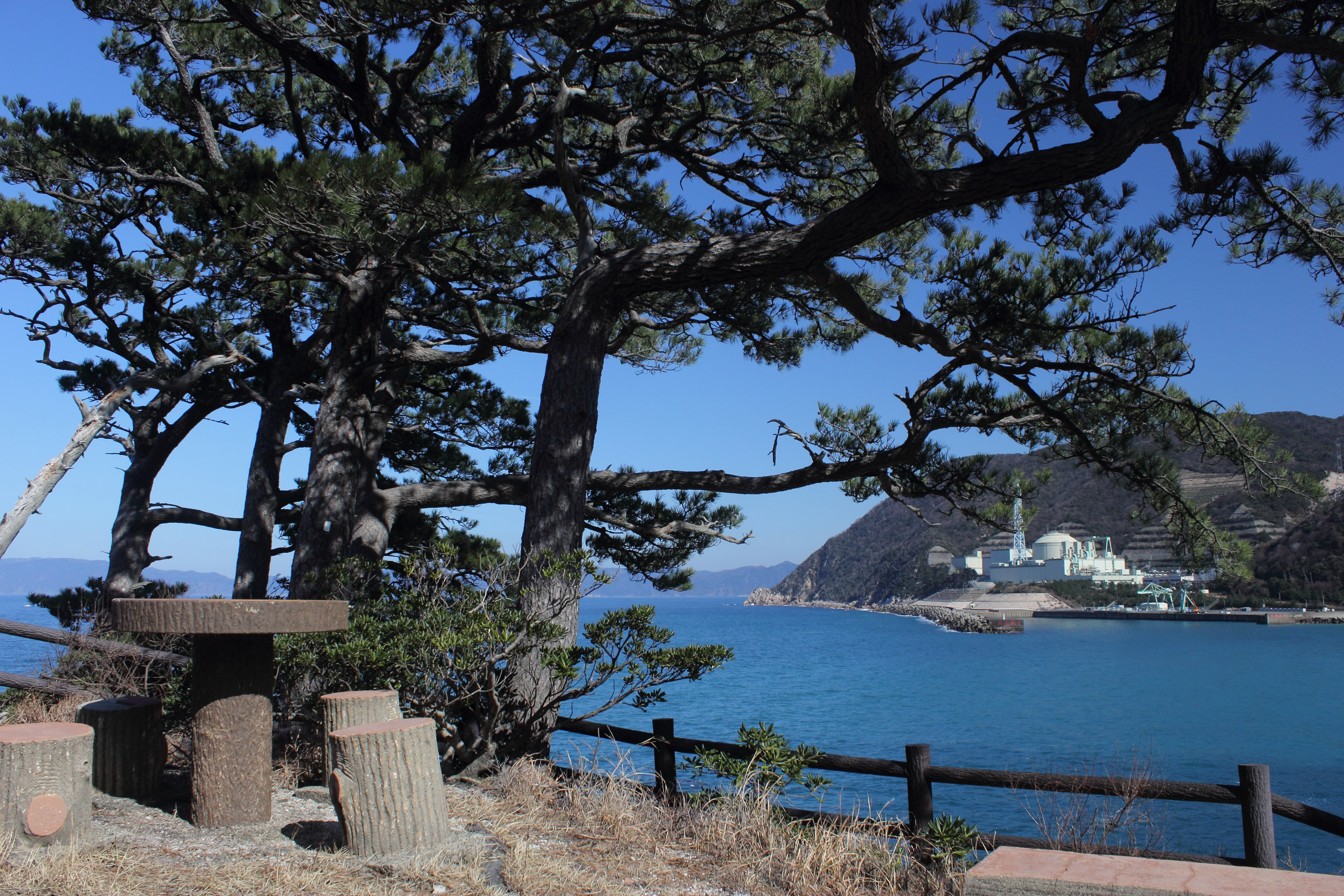 門ヶ崎の展望台